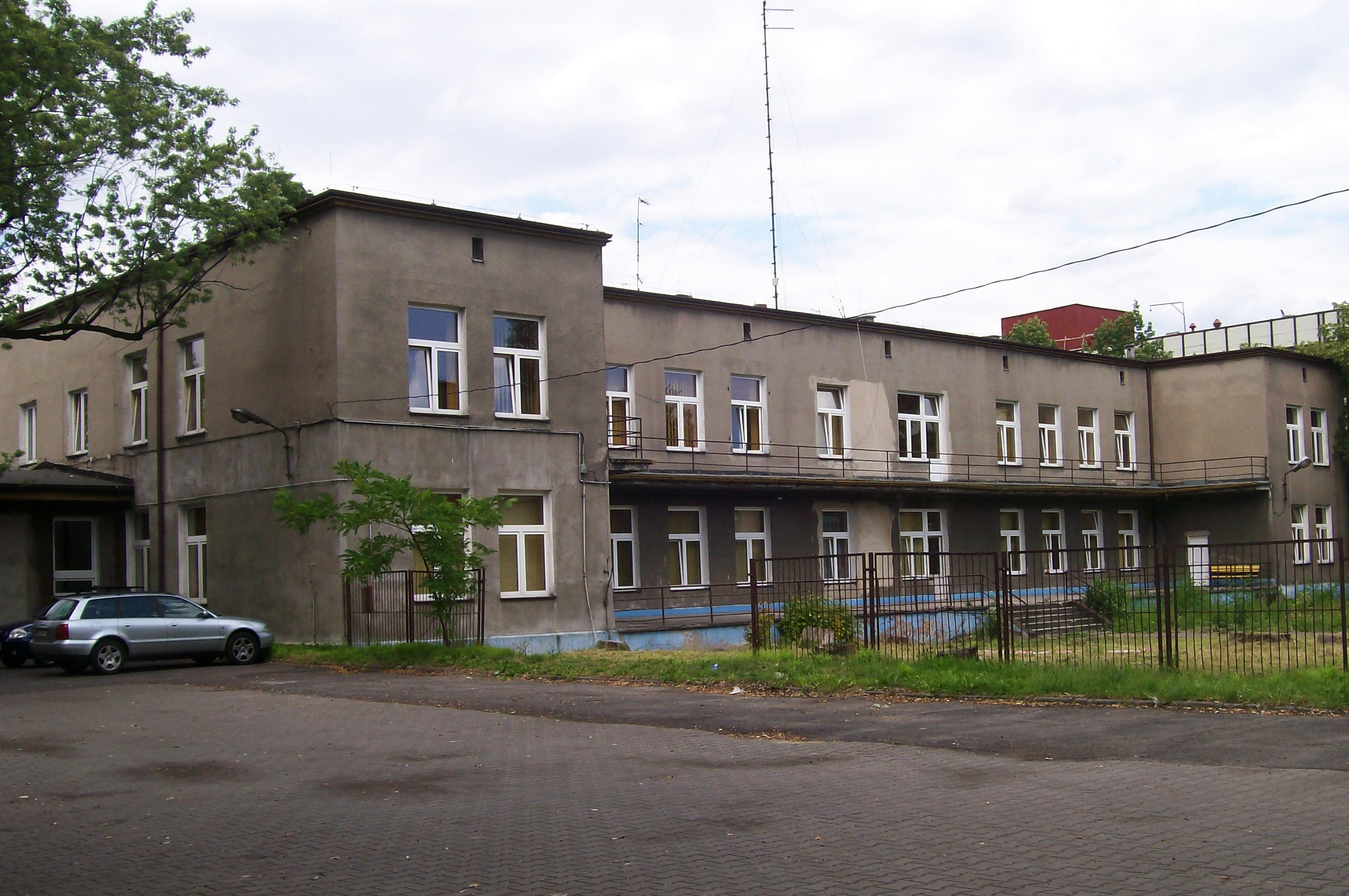 Jeden z budynków szpitala, Katowice ul. Raciborska 27